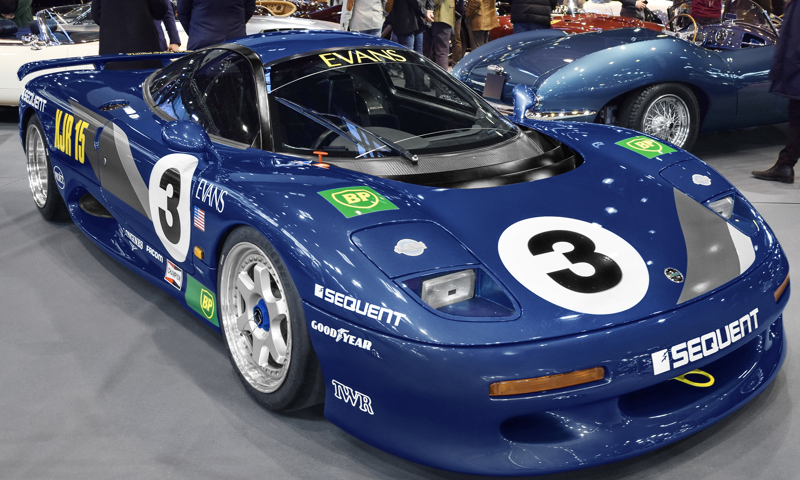 • Version basée sur la Jaguar XJR-9, gagnante des 24h du Mans en 1988. • Cet exemplaire conduit par Andy Evans a participé aux courses "Jaguar Sport Intercontinental Challenge". Année du modèle présenté : Janvier 1991 Châssis : 003-RACE Production : 53 exemplaires